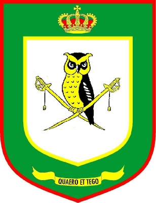 Logo officiel du Service général du renseignement et de la sécurité